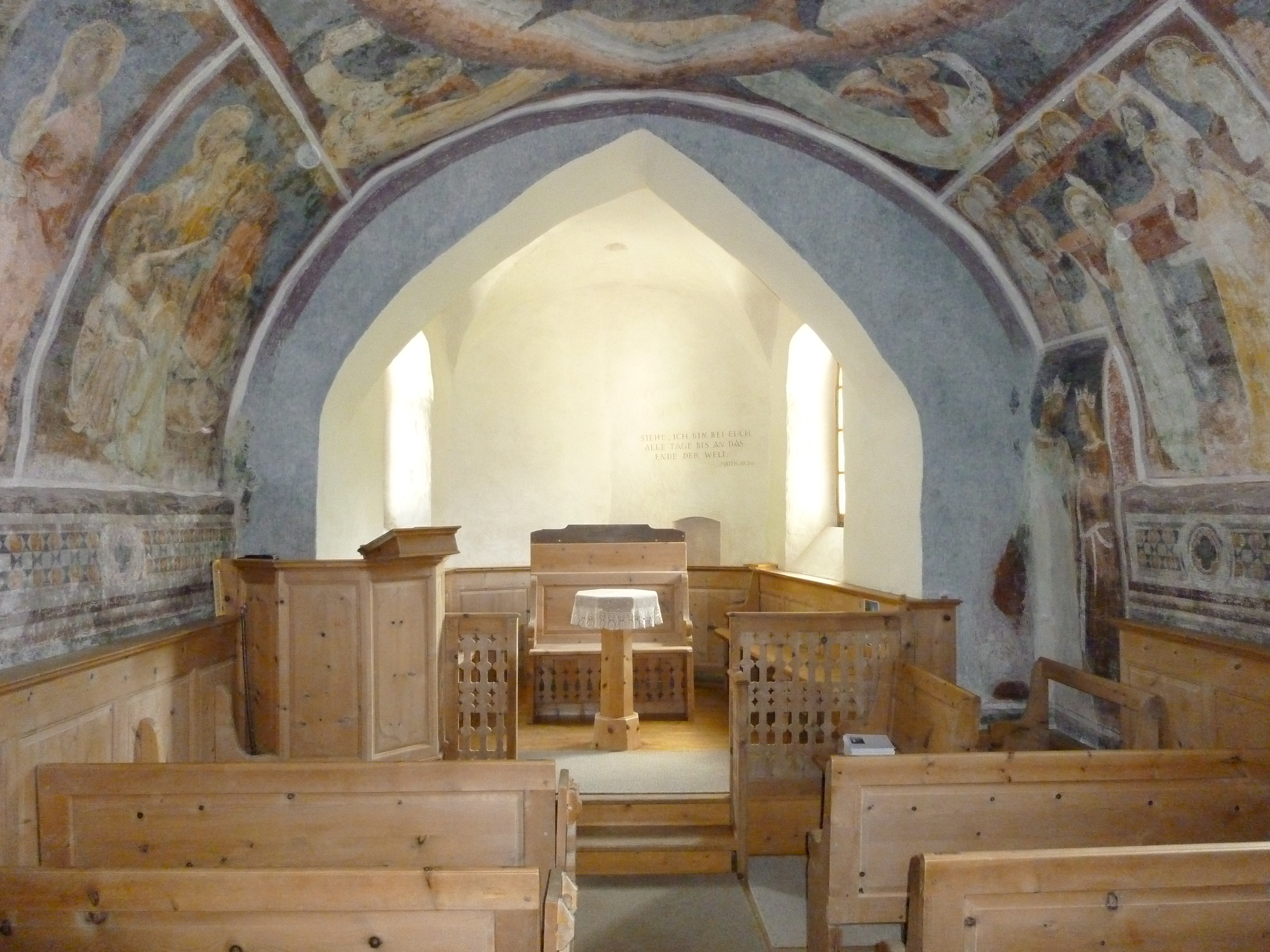 Reformierte Kirche Stugl: Chor